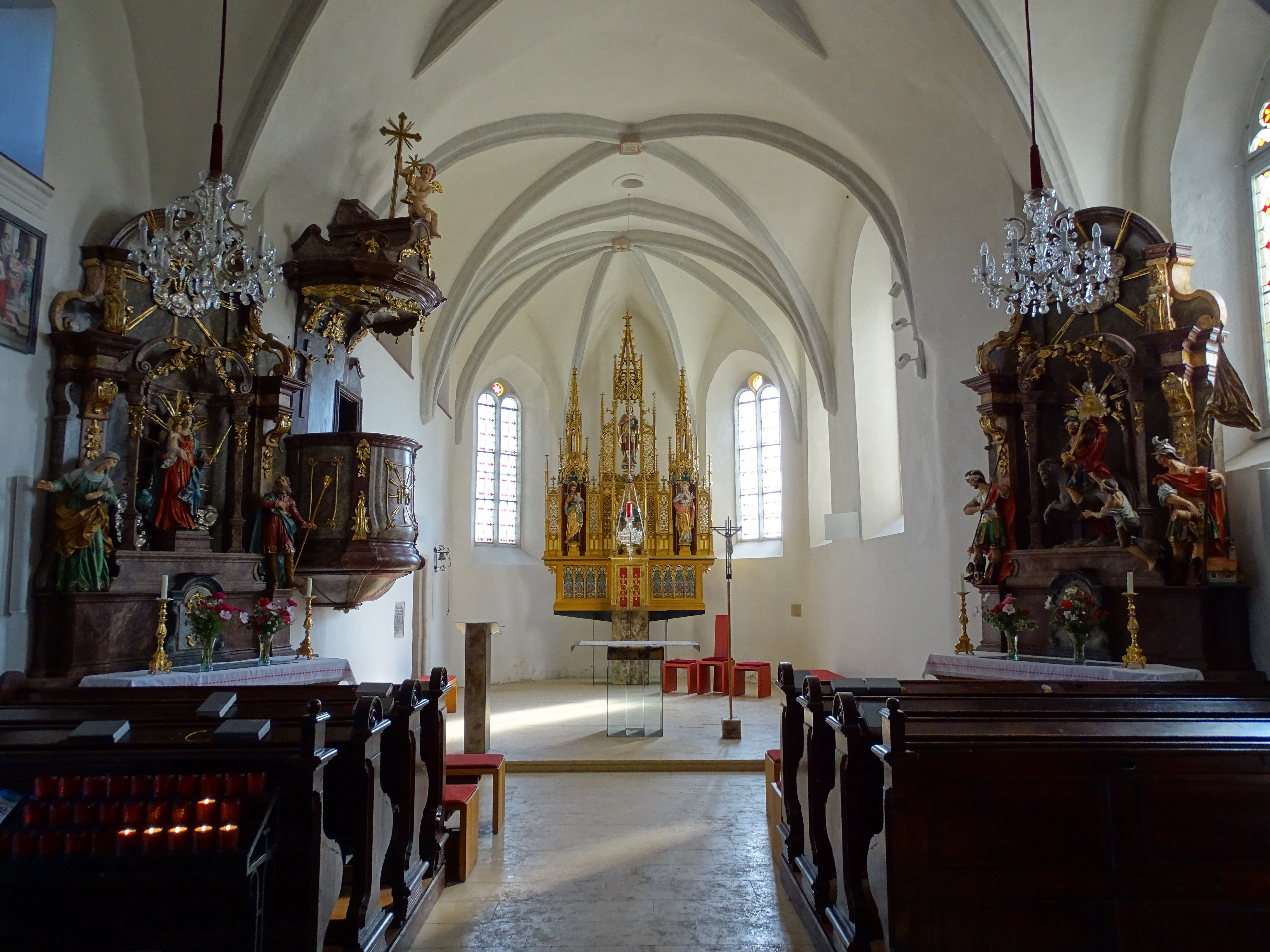 Blick auf den Hauptaltar sowie die beiden Seitenaltäre der Pfarrkirche Sankt Oswald bei Plankenwarth